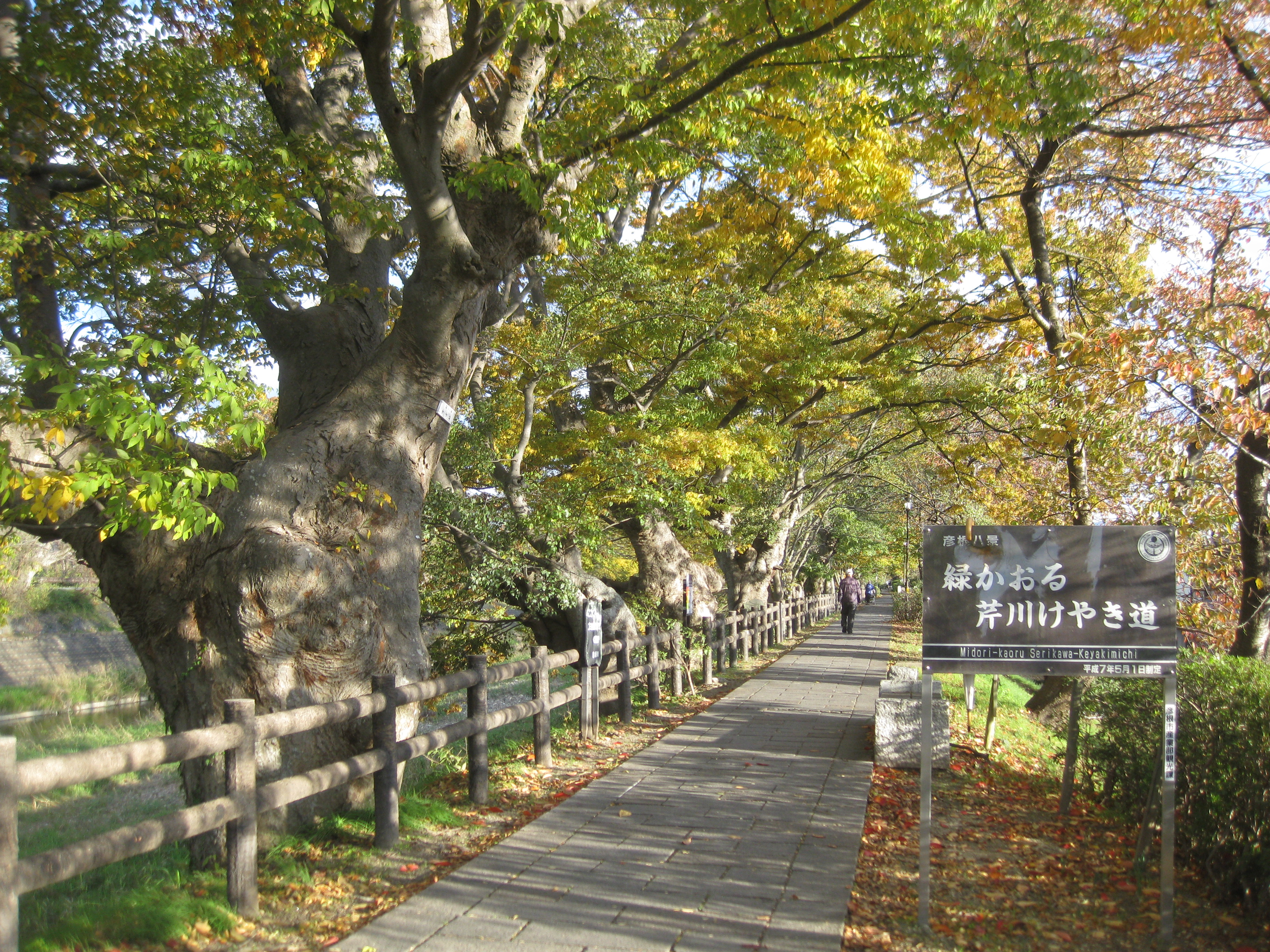 滋賀県彦根市の芹川けやき道。